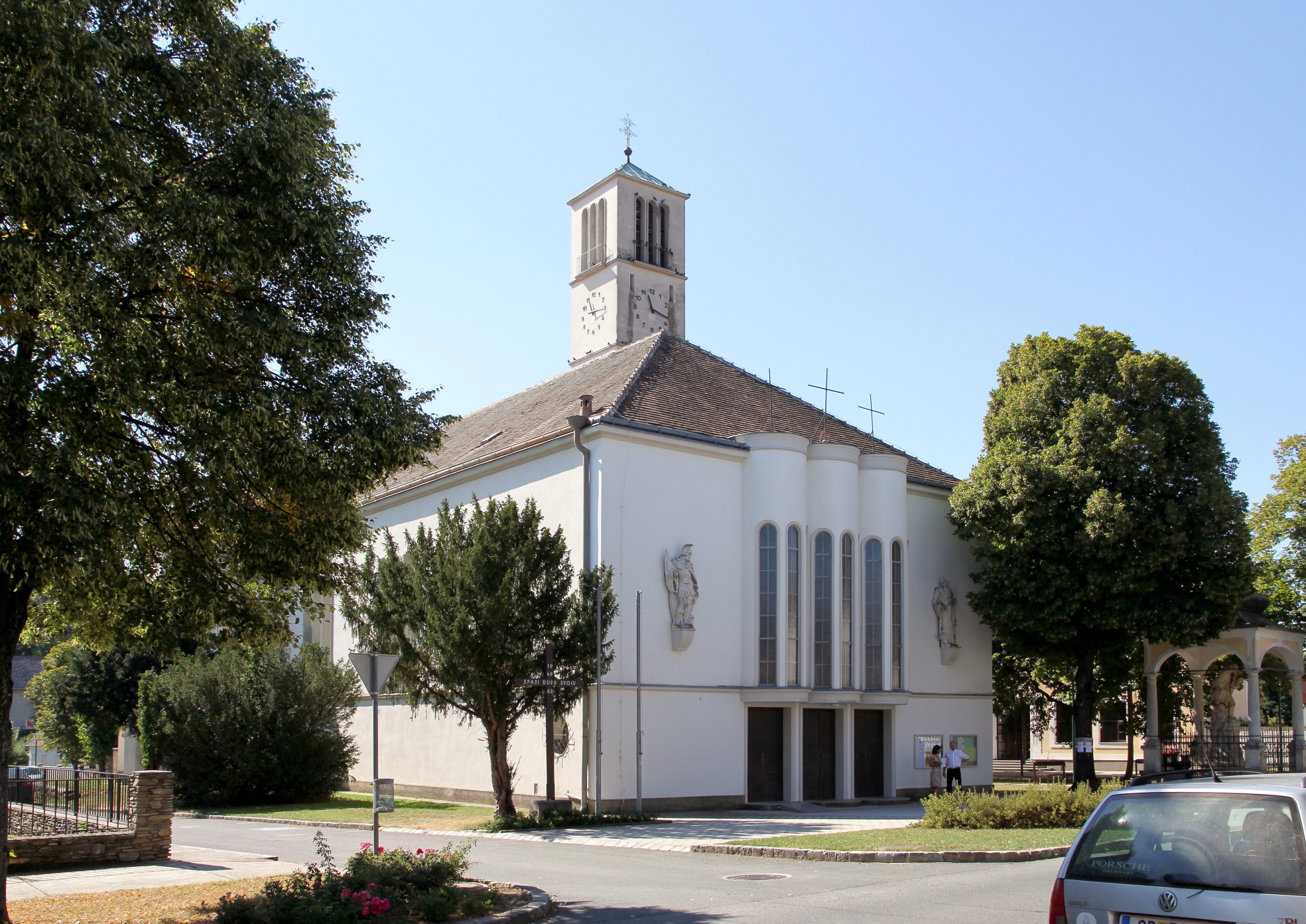 Katholische Pfarrkirche hl. Laurentius der burgenländischen Gemeinde Nikitsch. Unter Einbeziehung älterer Bauteile in den Jahren 1931/32 nach Plänen von Karl Holey gebaut.